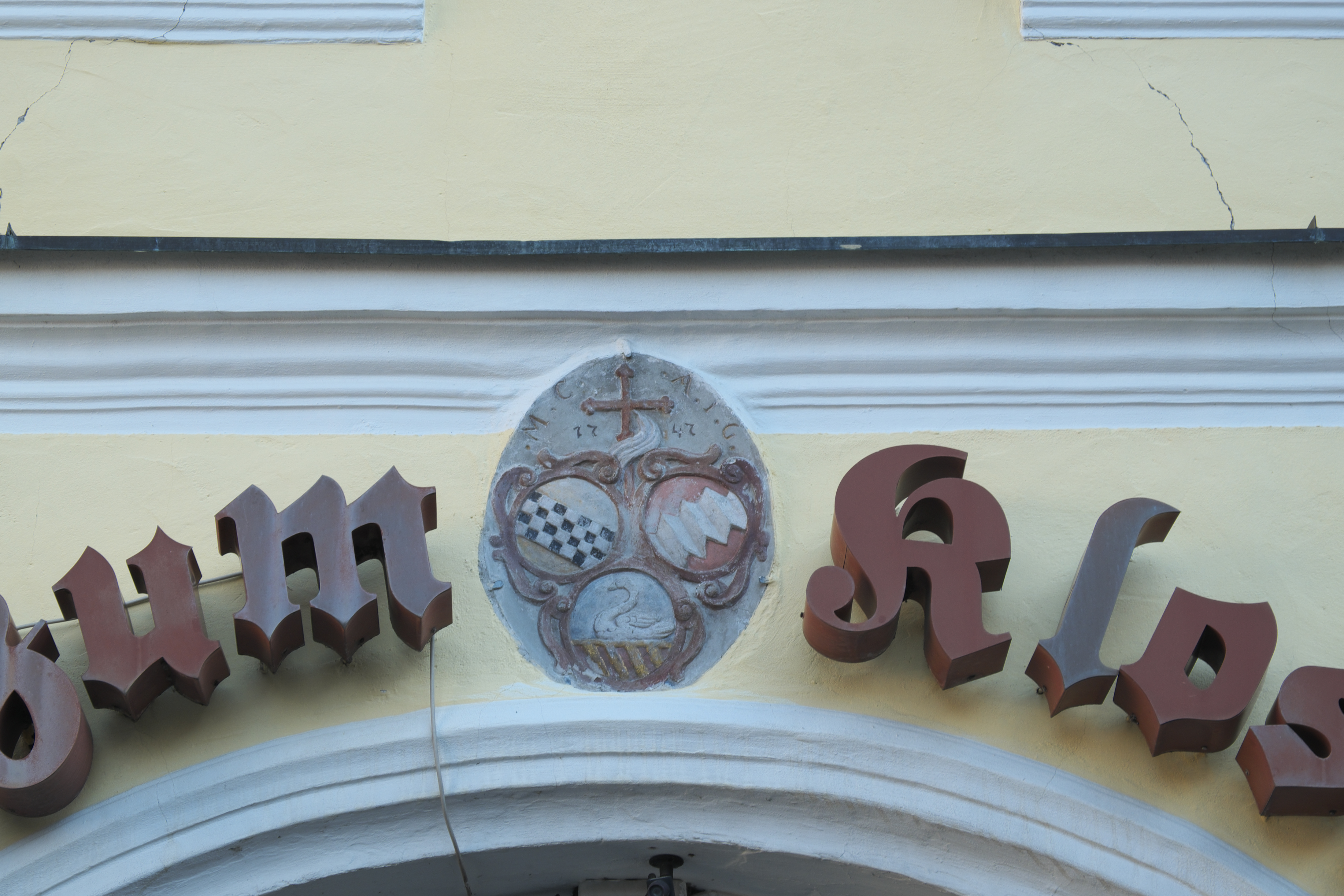 Klosterbräu am Stadtplatz 3 in Geisenfeld im Landkreis Pfaffenhofen an der Ilm (Bayern/Deutschland)